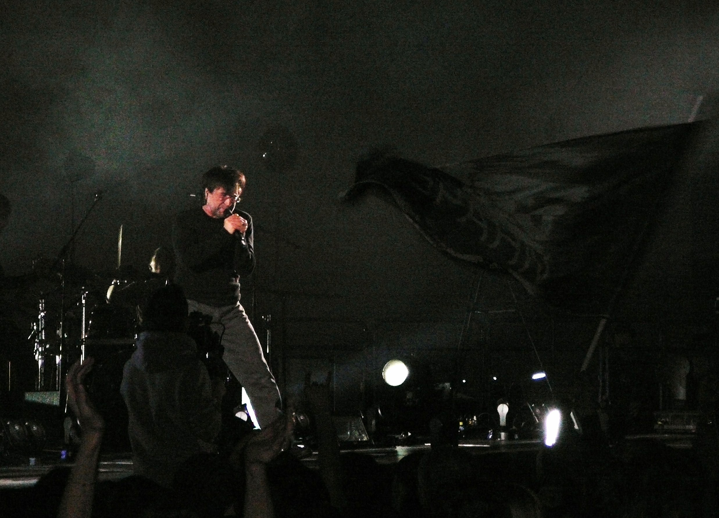 Шевчук Юрий Юлианович - на концерте группы "ДДТ" "Иначе" (г. Казань, 16 декабря 2011 г.).